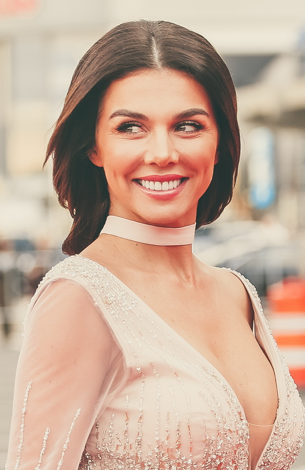 Анна Седокова на премии телеканала «RU.TV 2016» в Москве